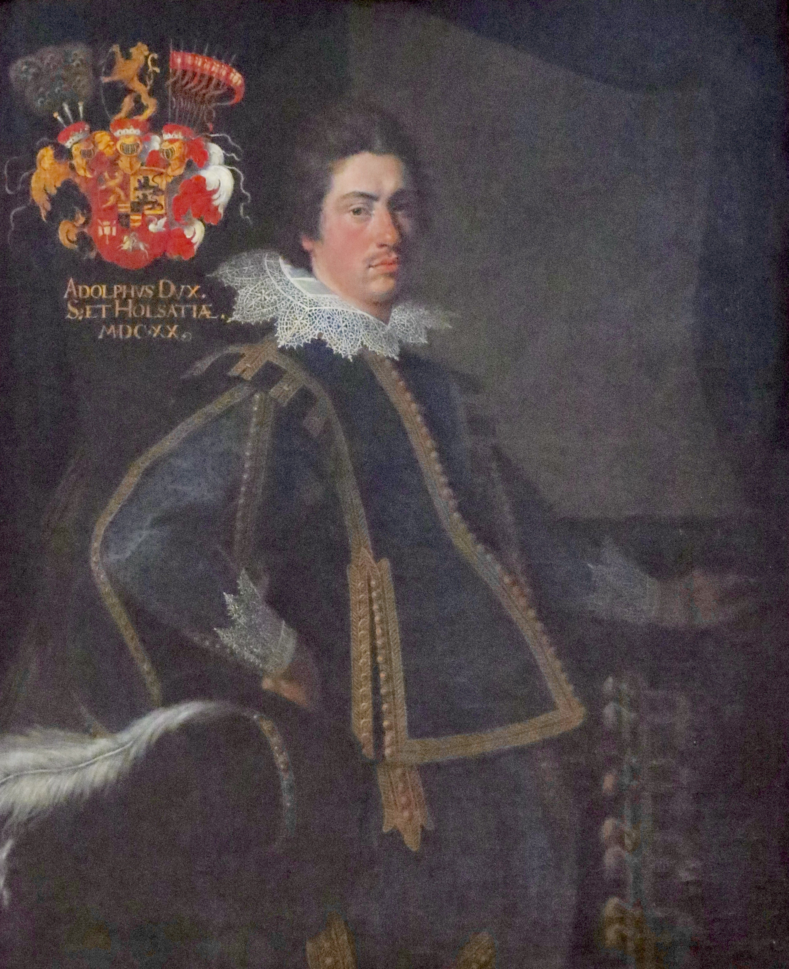 Adolf af Slesvig-Holsten-Gottorp (1600-1631), Jacob van Doort, Gottorp Slot, Sydslesvig